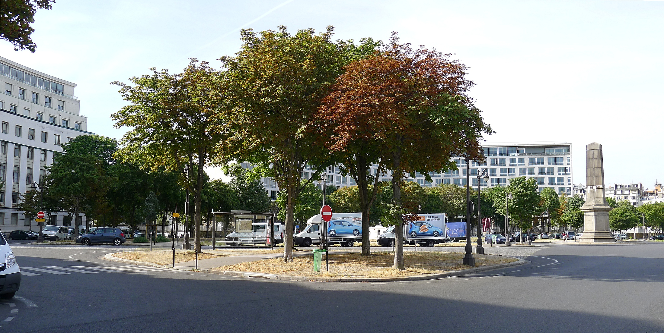 Place de Fontenoy - Paris VII